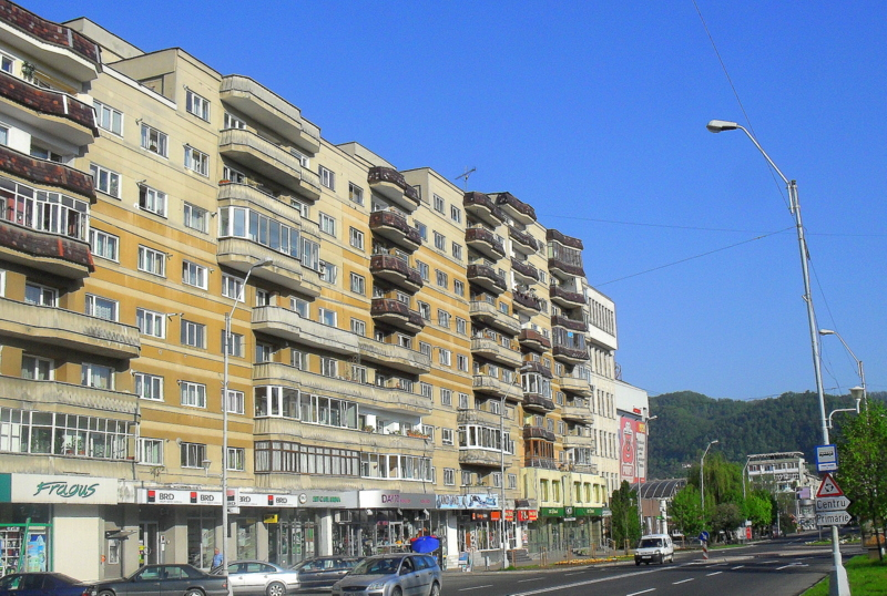 Baia Mare